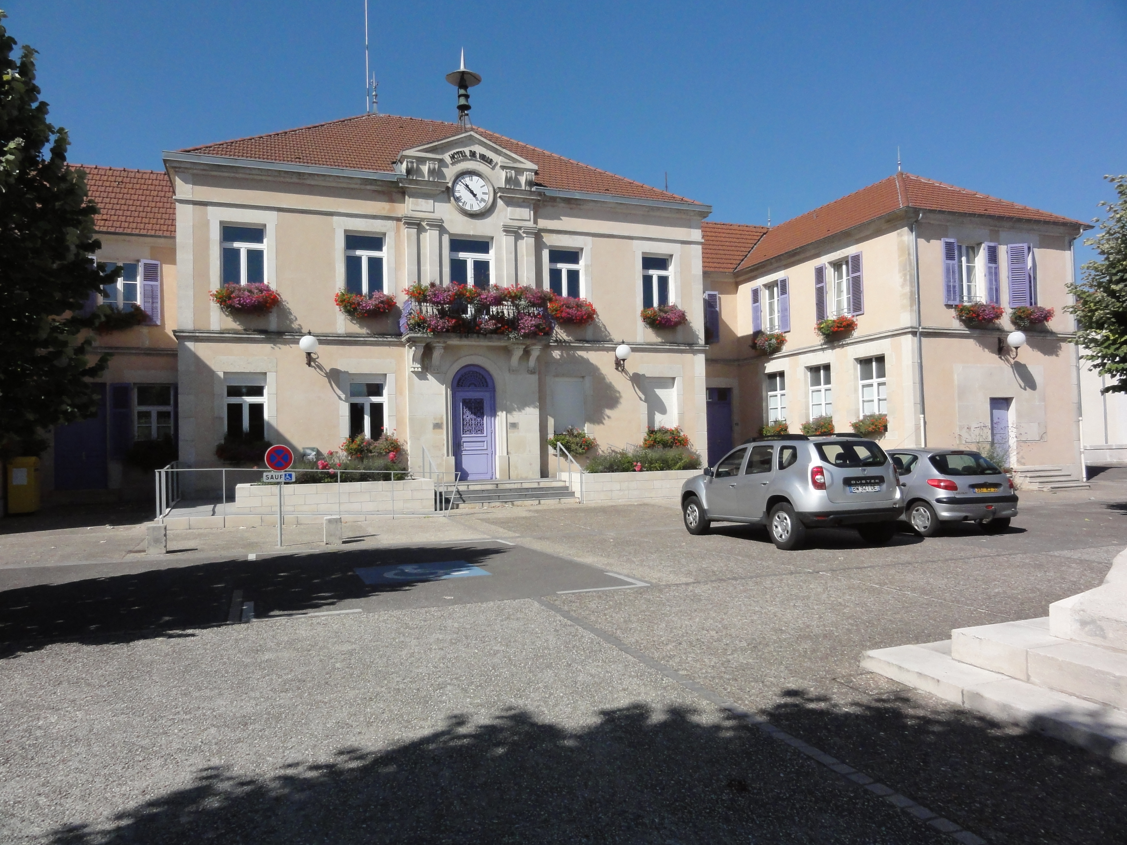 Lérouville (Meuse) mairie